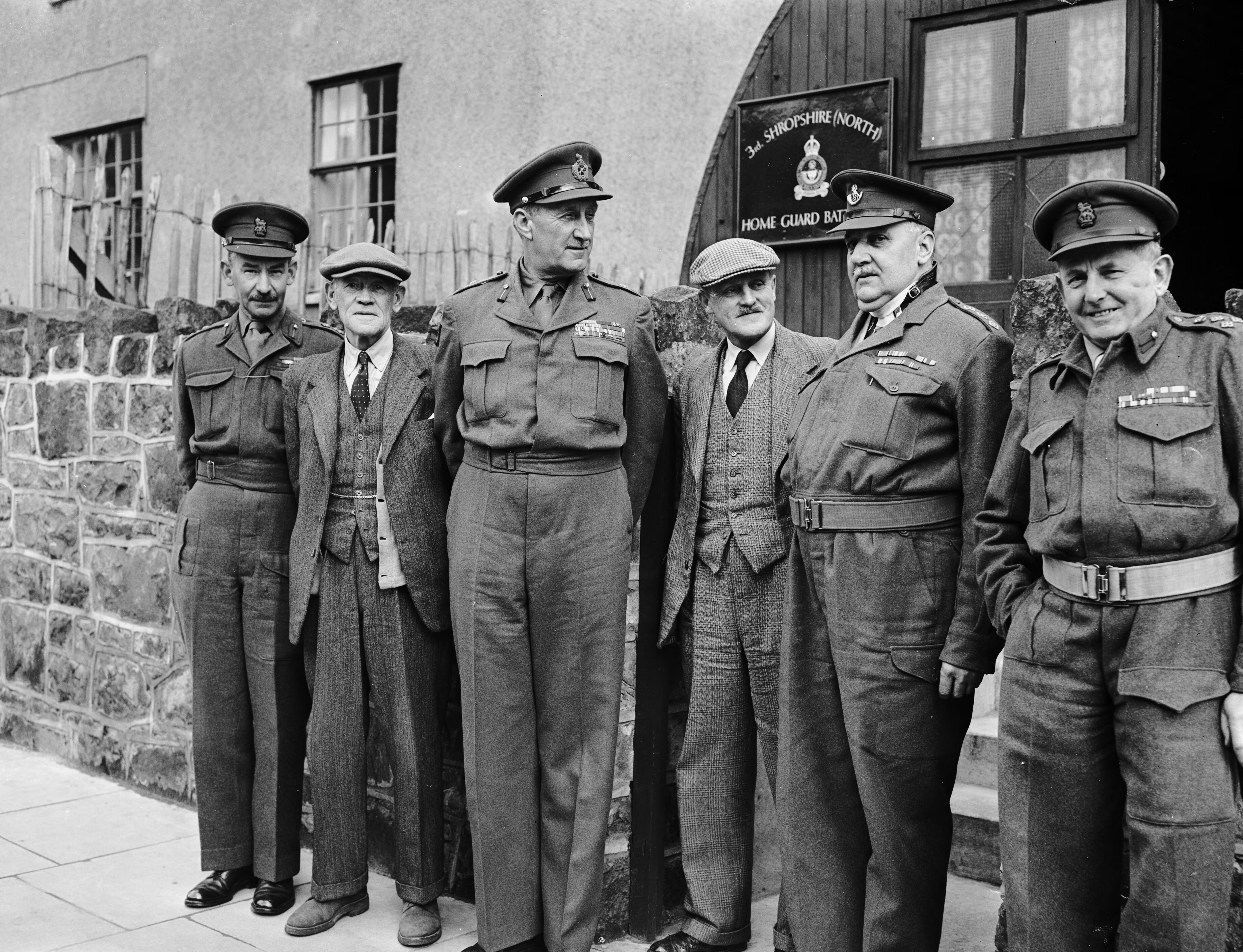 Teitl Cymraeg/Welsh title: Is-gadfridog Lashner G Whistler (Swyddog Gyffredinol Cadbennaethol yr Awdurdod Gorllewinol) gyda Cadlywyddion y Gwarchodlu Cartref lleol yng Nghroesoswallt Ffotograffydd/Photographer: Geoff Charles (1909-2002) Dyddiad/Date: March 31, 1954. Cyfrwng/Medium: Negydd ffilm / Film negative Cyfeiriad/Reference: (gch05777) Rhif cofnod / Record no.: 3367670 Rhagor o wybodaeth am gasgliad Geoff Charles yn Llyfrgell Genedlaethol Cymru More information about the Geoff Charles Collection at the National Library of Wales